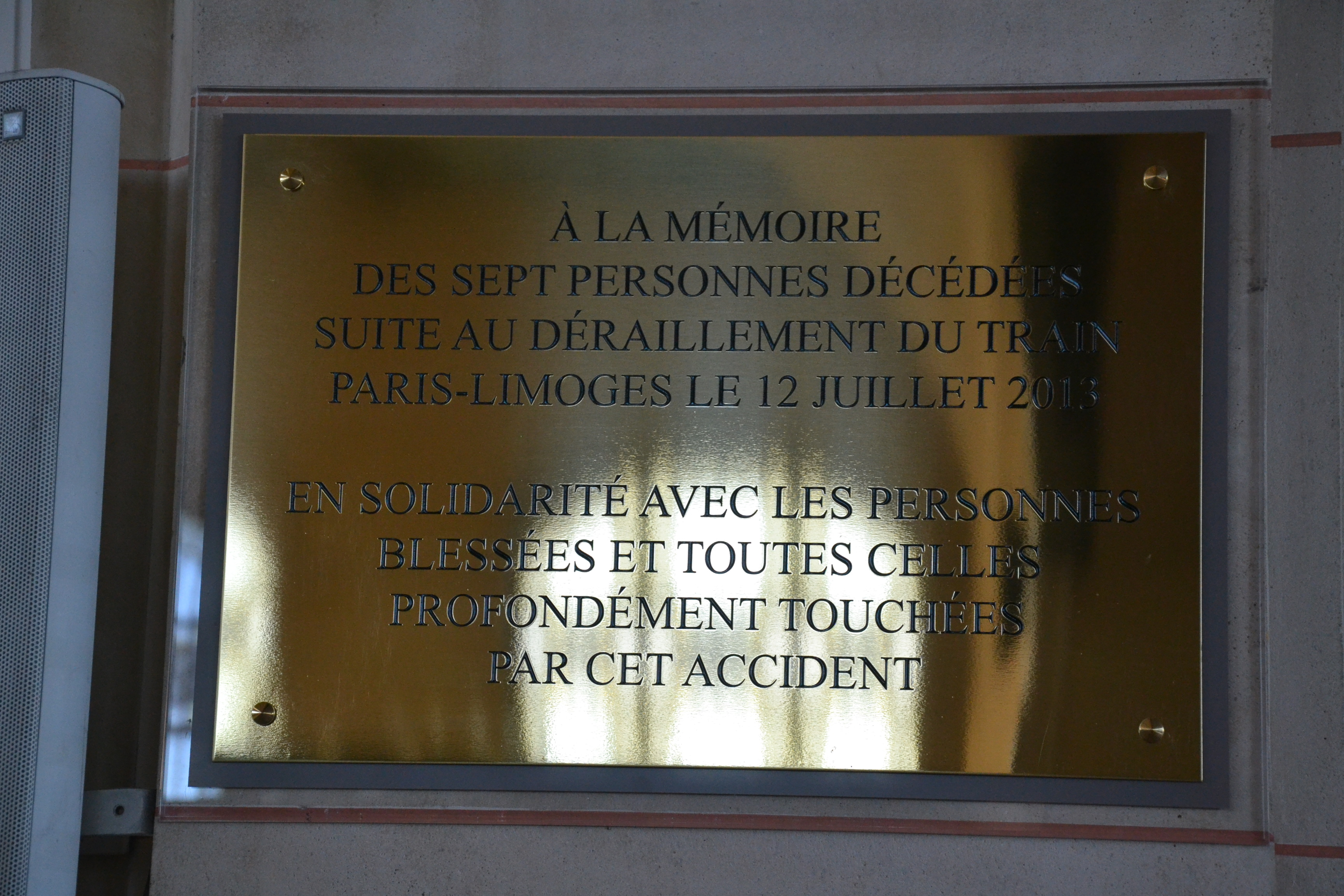 Plaque en hommage aux victimes de la catastrophe ferroviaire de Brétigny-sur-Orge, en gare de Limoges-Bénédictins.